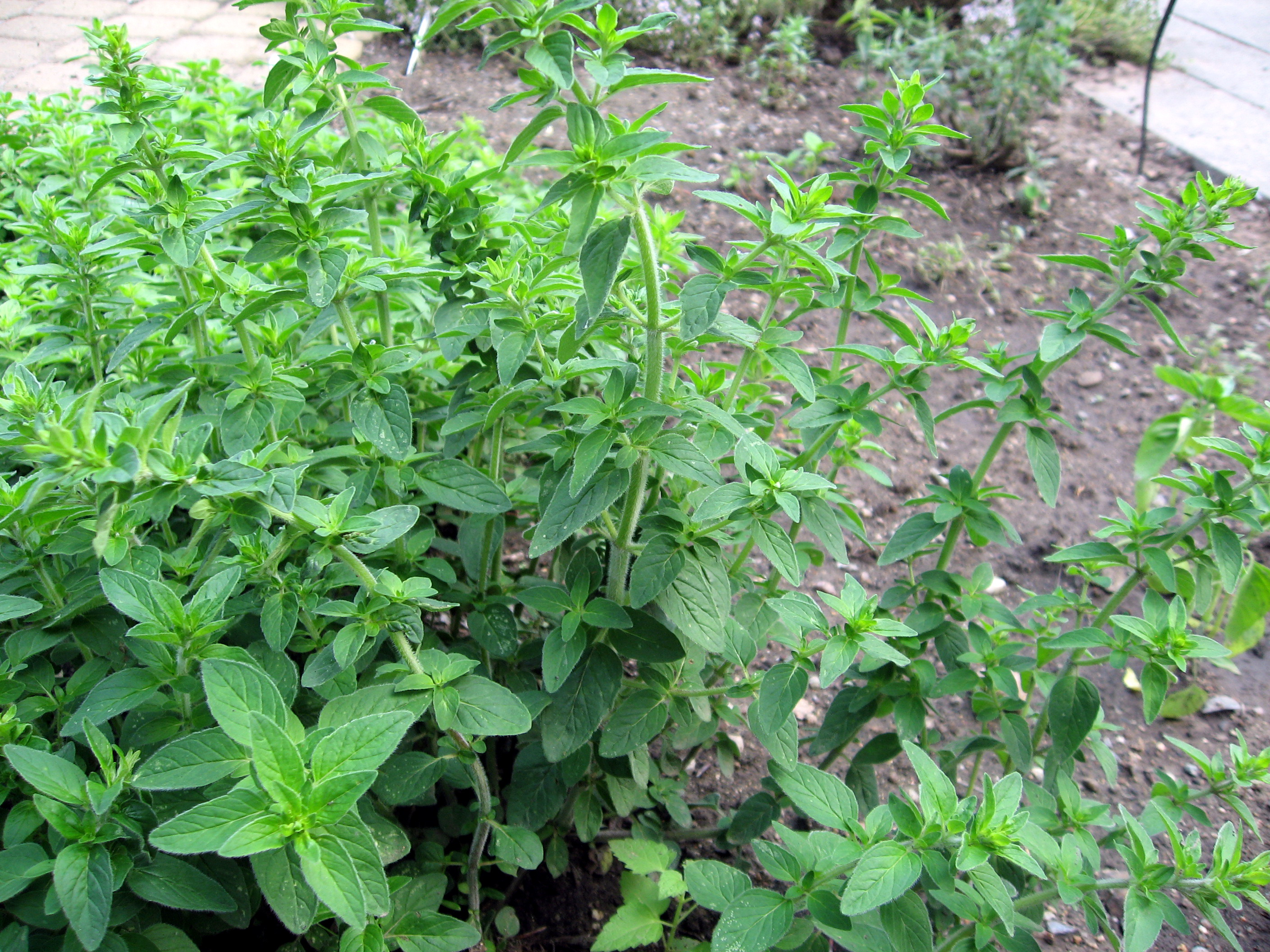 Dobromysl obecná Origanum vulgare